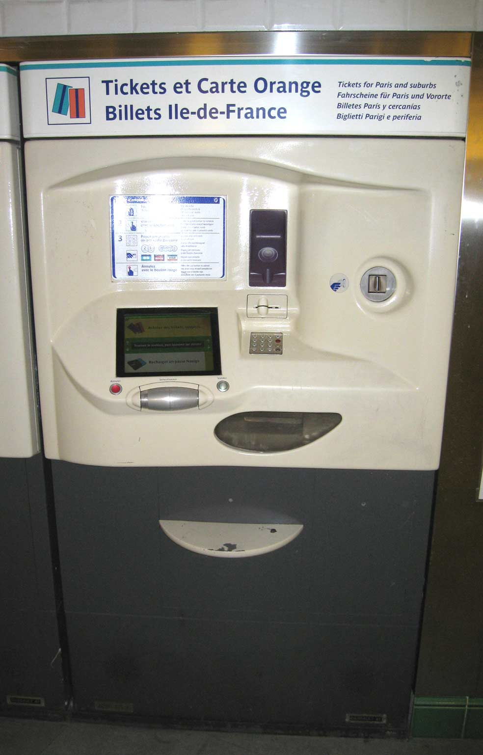 Metro de Paris Distributeur automatique de billet à la station Saint Lazare Lieu : Paris, France Date : Juin 2006 Auteur : Pline photo personnelle